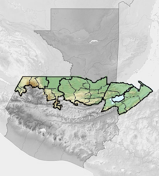 Mapa en relieve de la Franja Transversal del Norte de Guatemala